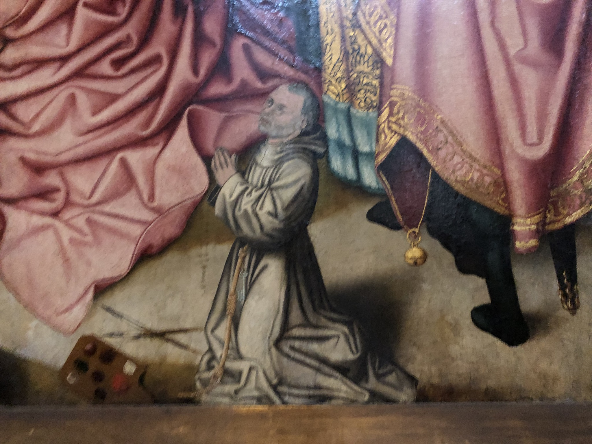 Detail aus der Kalvarienbergdarstellung in St. Panthaleon Köln, Deutschland